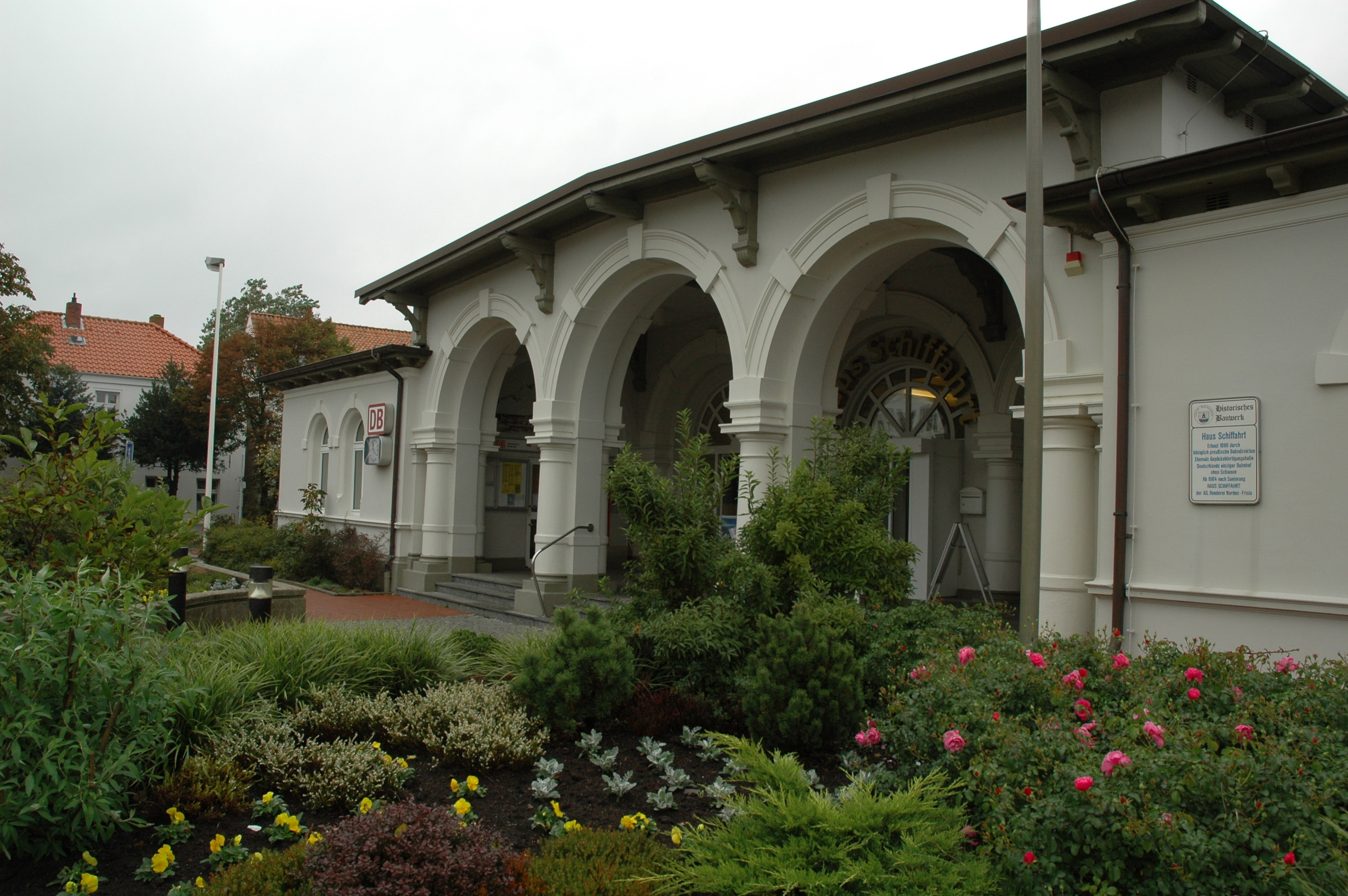 Haus Schiffahrt auf Norderney